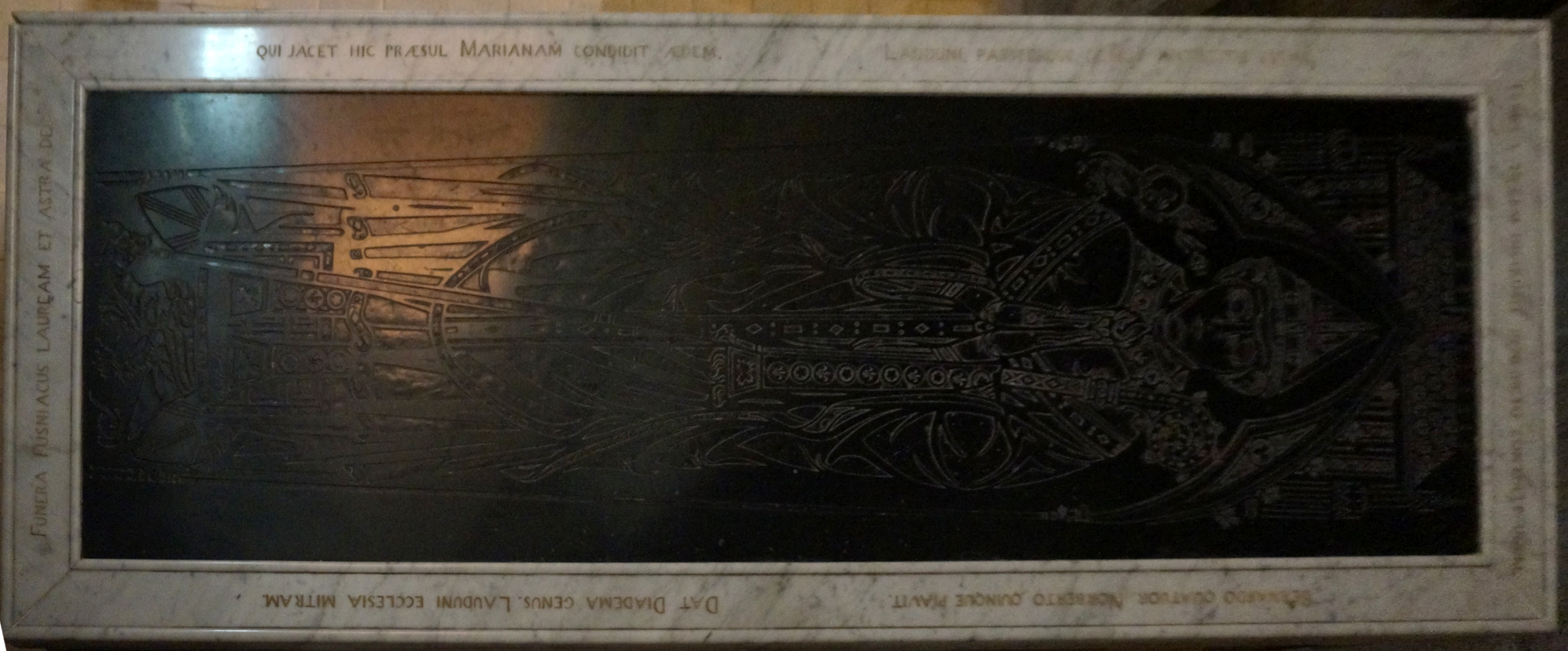 gisants, Cathédrale Notre-Dame de Laon.